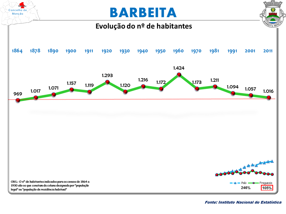 Censos 1864/2011